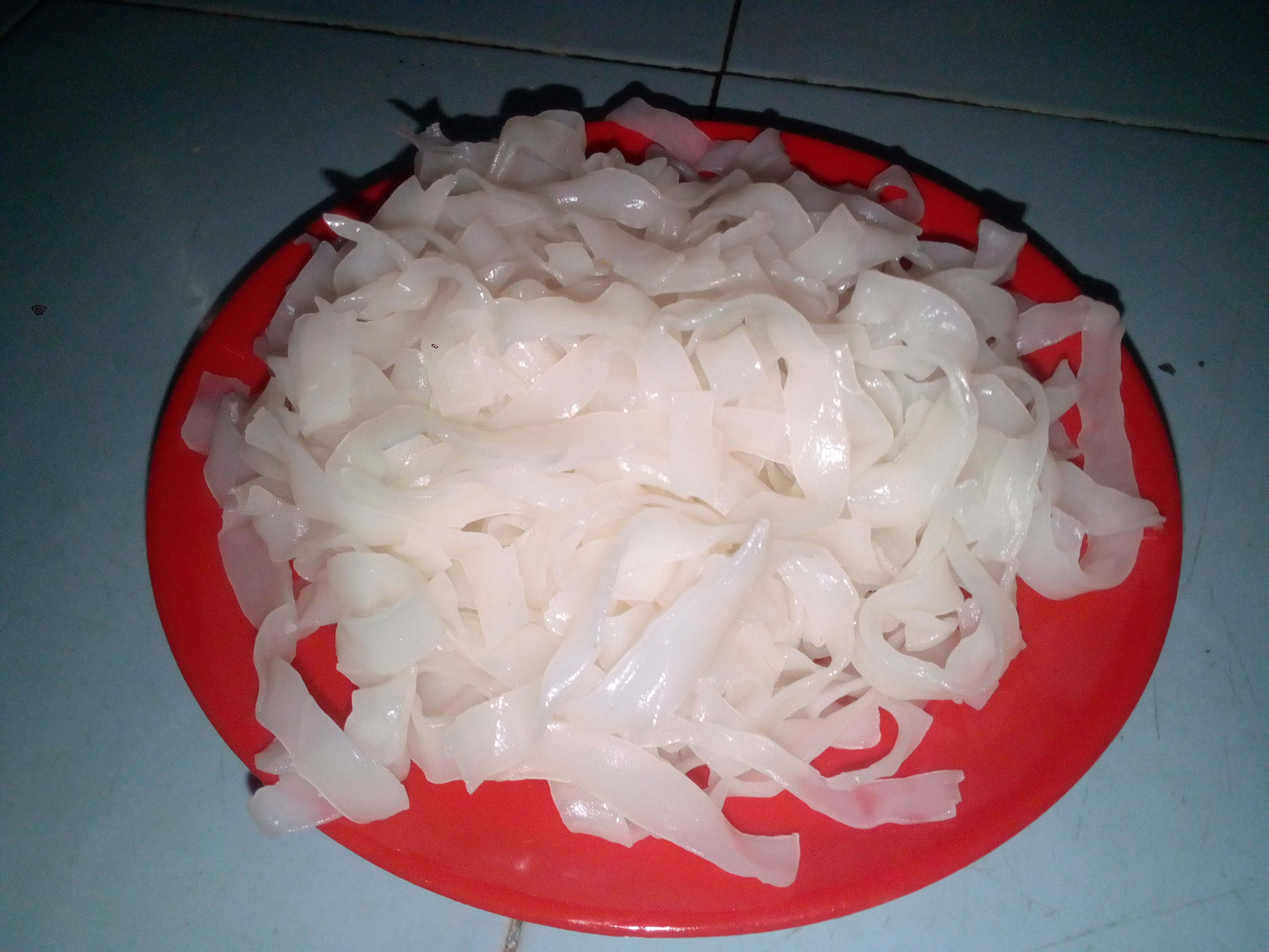 Kwetiau basah yang berminyak lapisannya agar mencegah kwetiau tidak lengket satu sama lain.siap dimasak